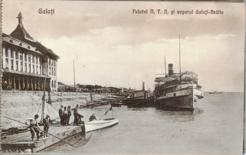 Portul Galati